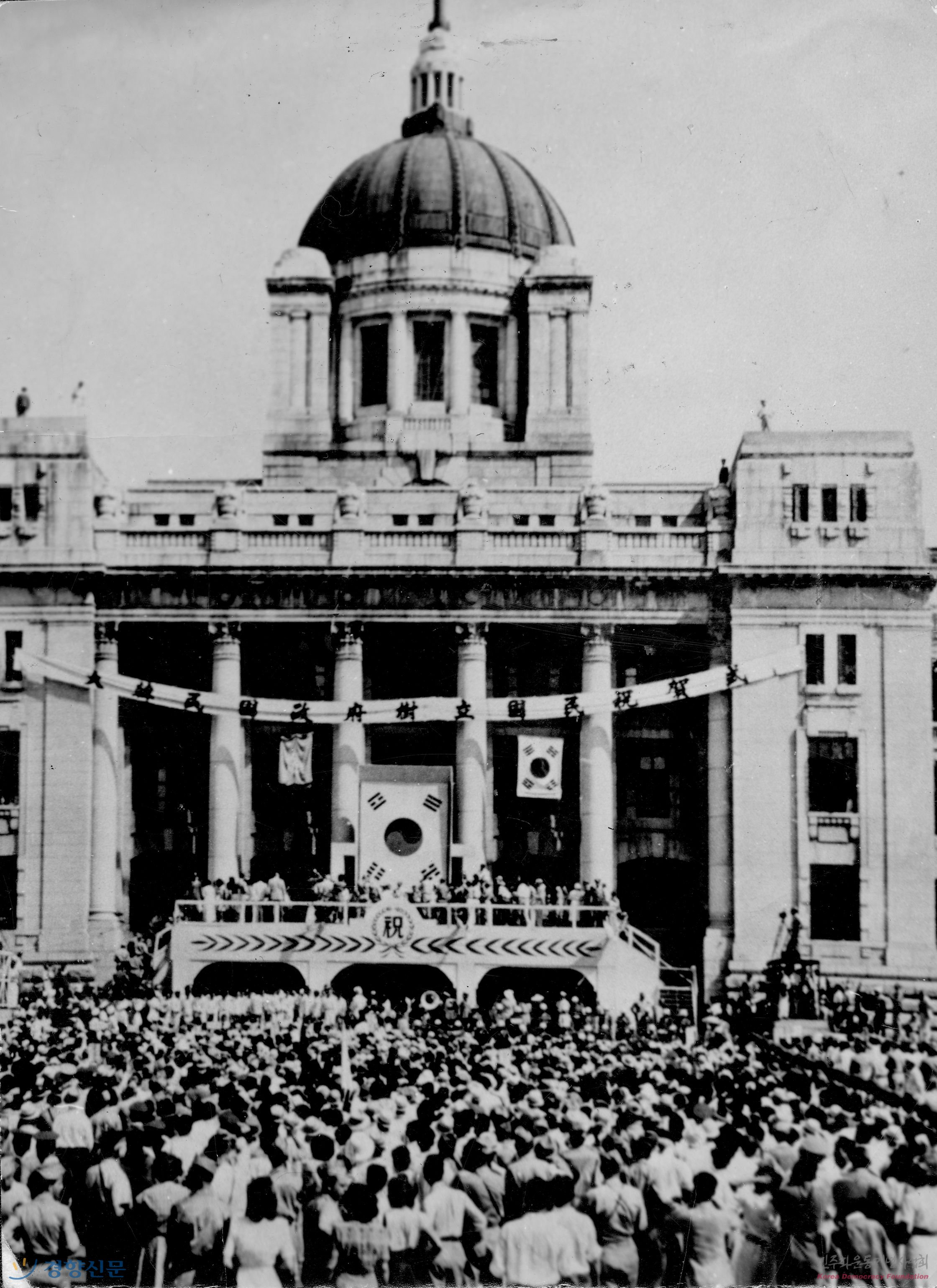 조선총독부 건물 앞에서 대한민국 정부수립을 축하하는 식이 벌어지는 가운데 많은 사람들이 모여 있는 모습